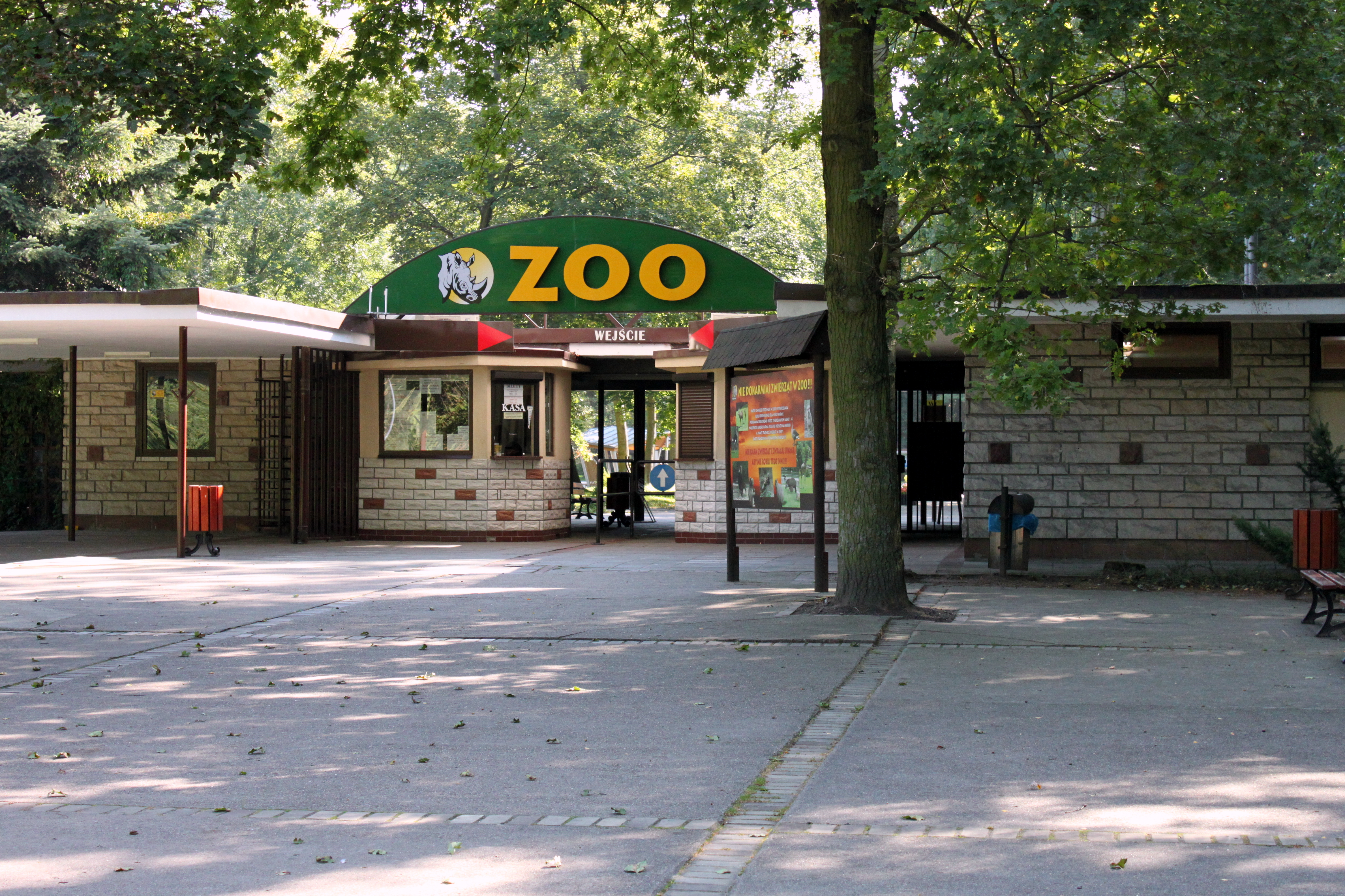 Nowe Zoo Poznań